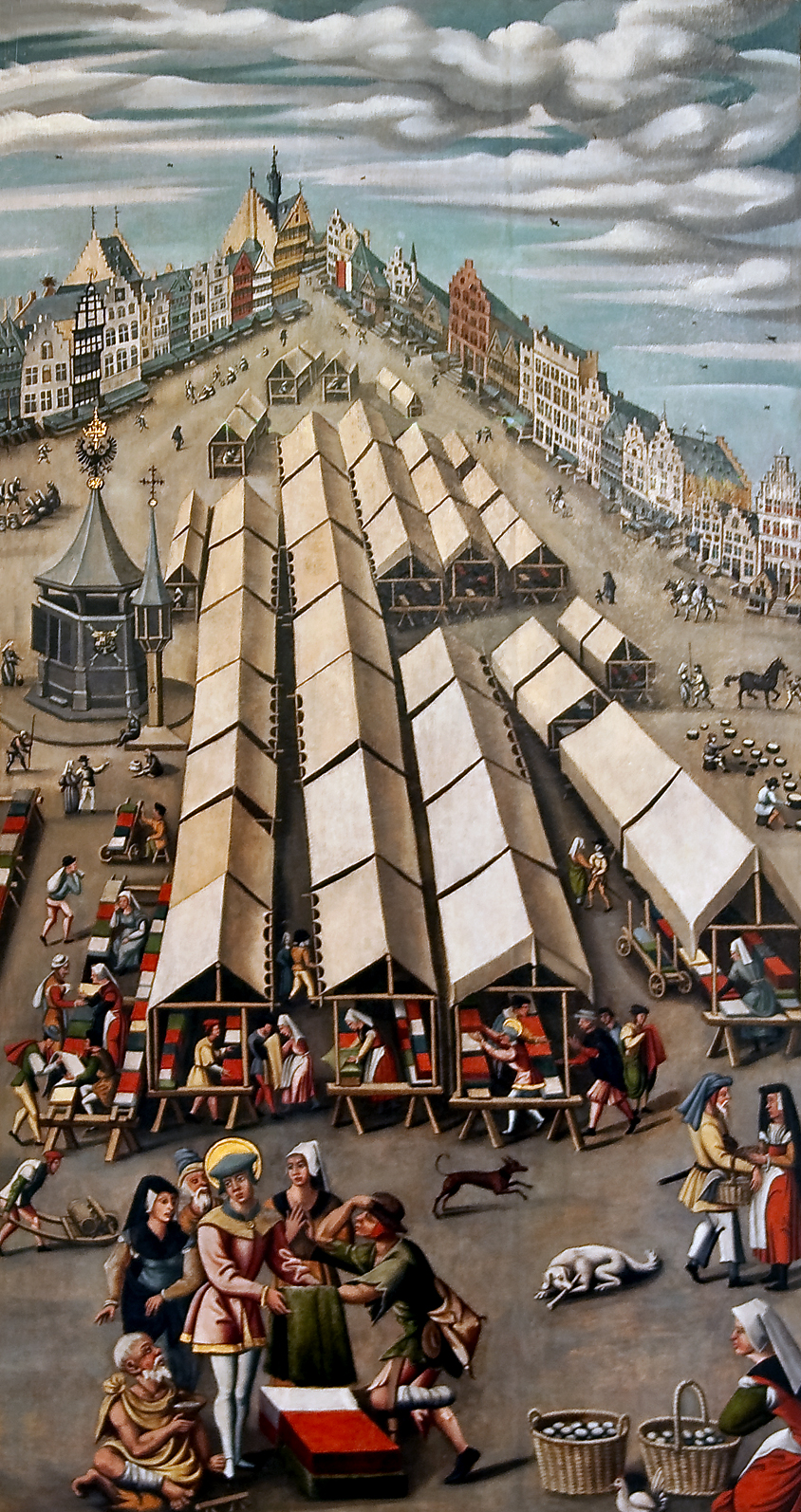 De Markt te 's-Hertogenbosch gezien vanaf de Korte Kerkstraat naar de Hoge Steenweg. Op de voorgrond Sint-Franciscus, de patroonheilige van het gewandsnijders- en droogscheerdersgilde, die stoffen uitdeelt aan de armen.